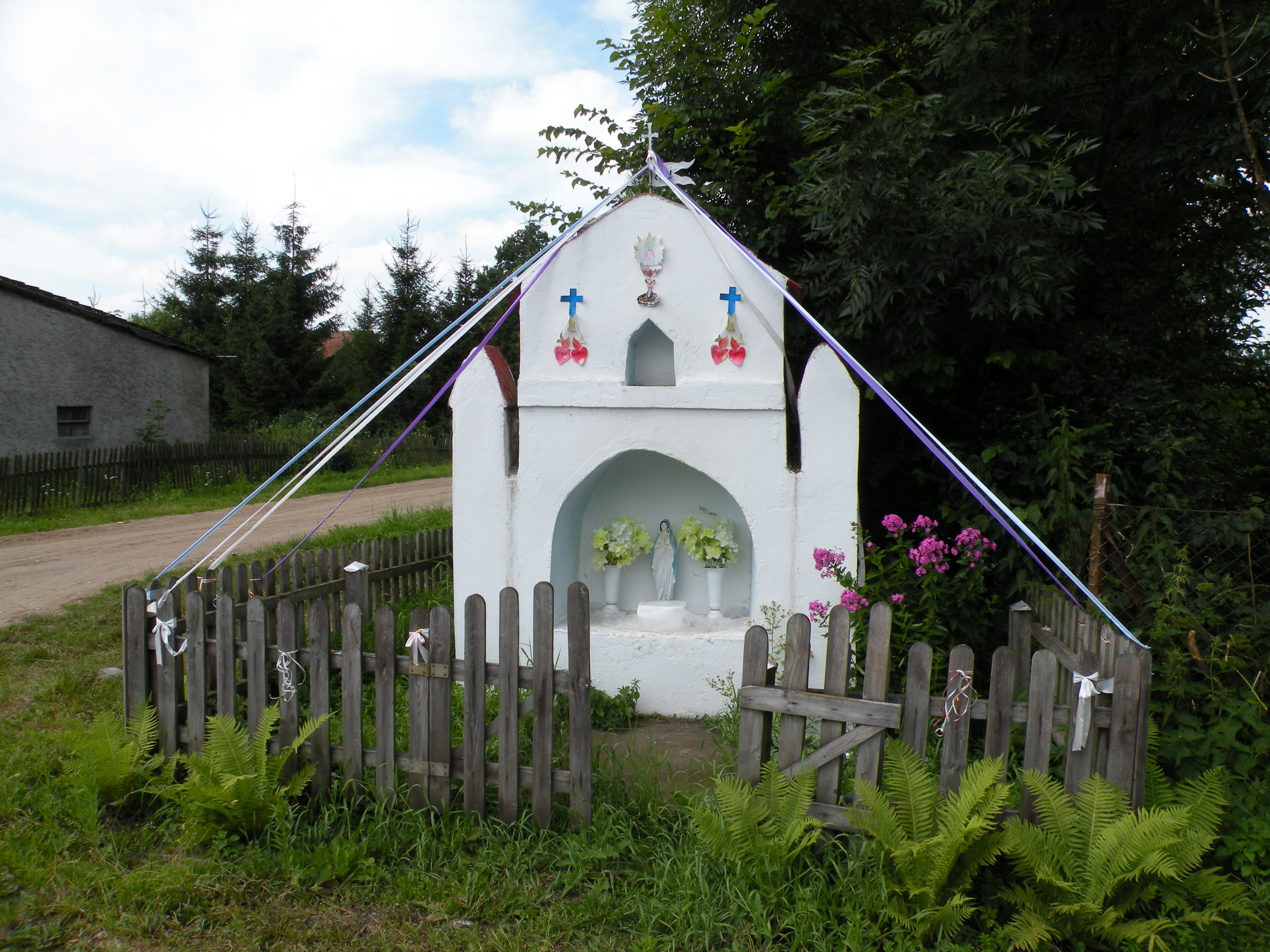 Paluzy, kapliczka w środku wsi przy sklepie, przed drogą do kościoła